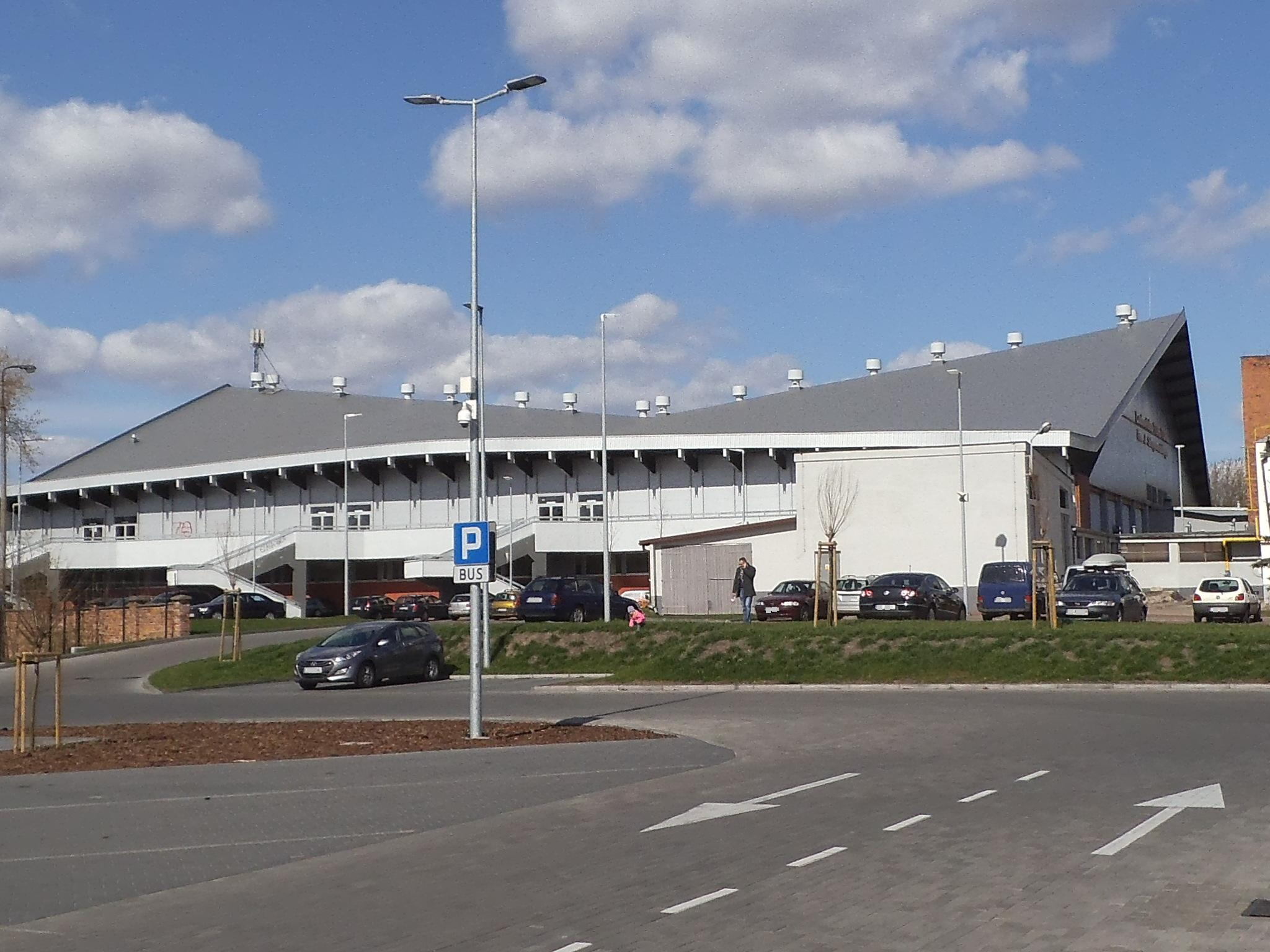 Tor Tor - lodowisko w Toruniu